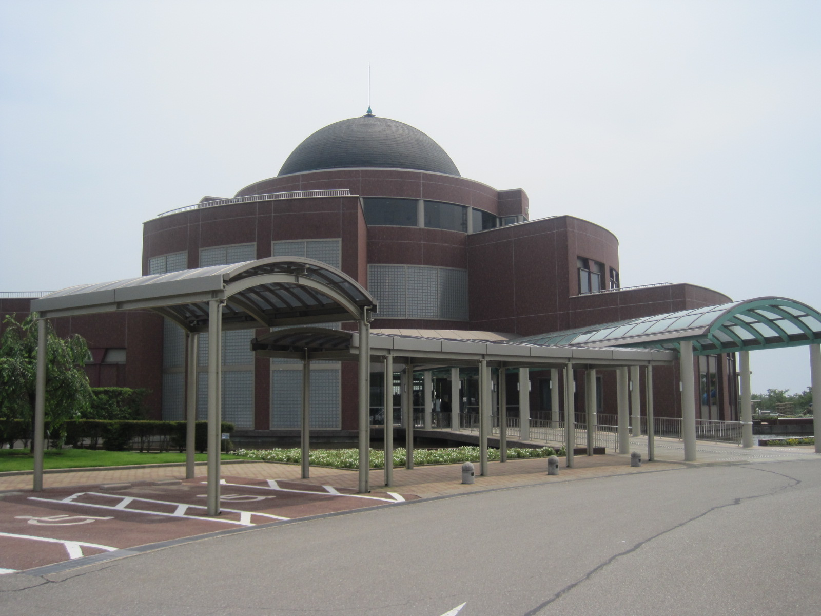 志賀原子力発電所のPR施設アリス館志賀（石川県羽咋郡志賀町）